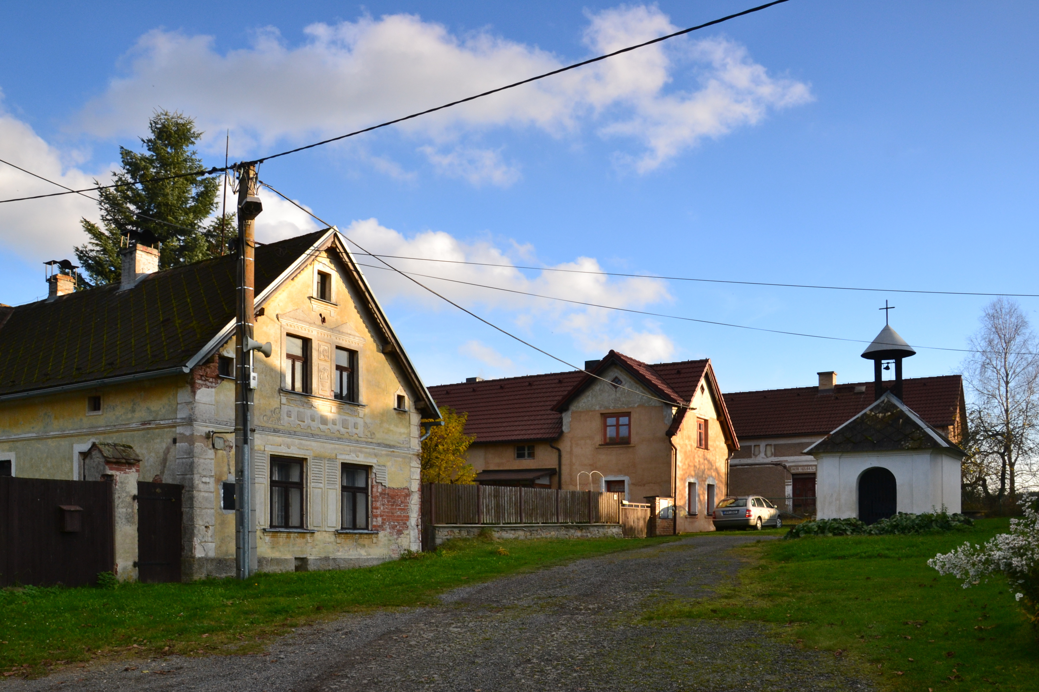 Plachtín - náves s kaplí